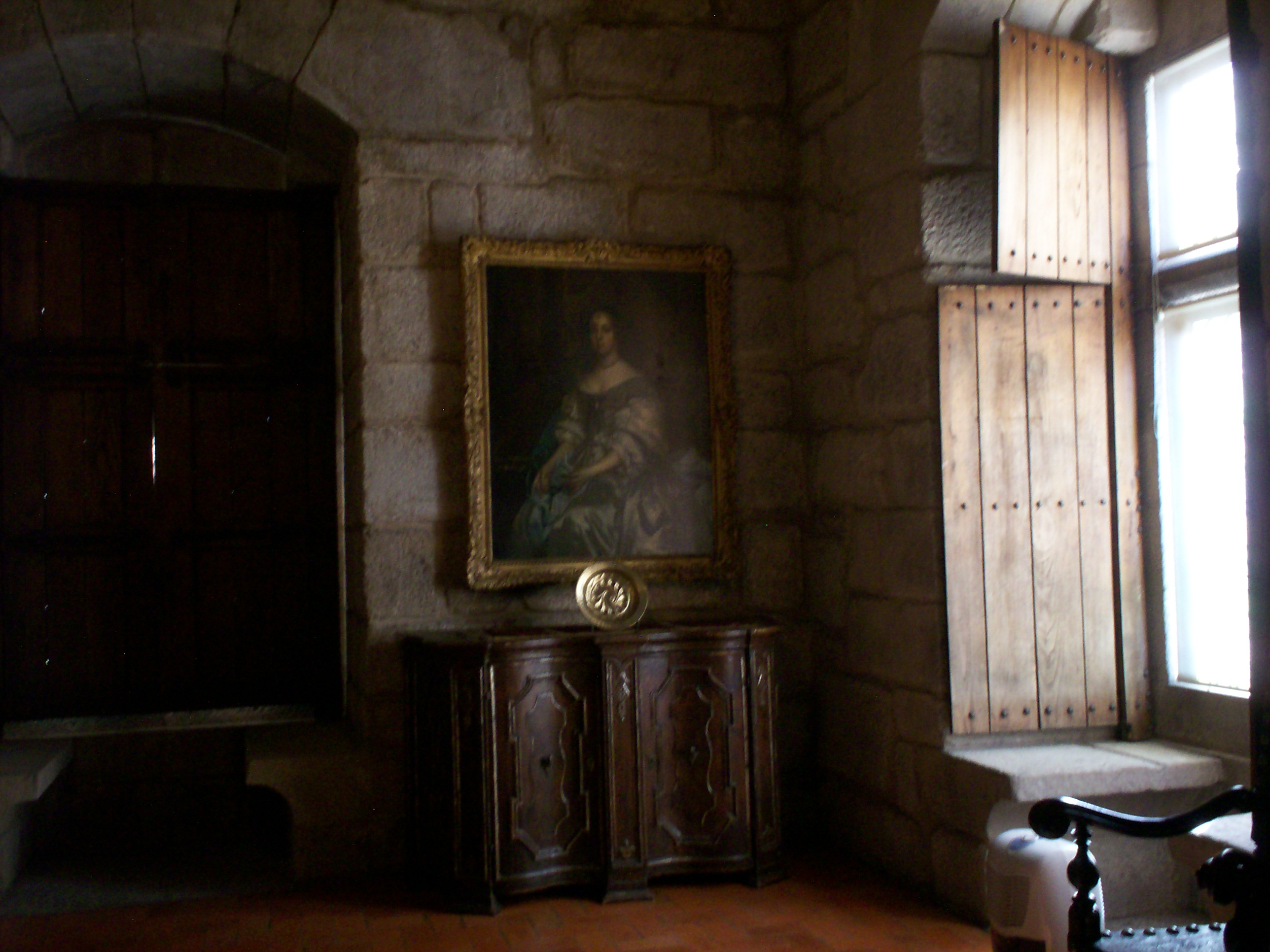 Quarto da infanta dona Catarina de Bragança, rainha de Inglaterra.